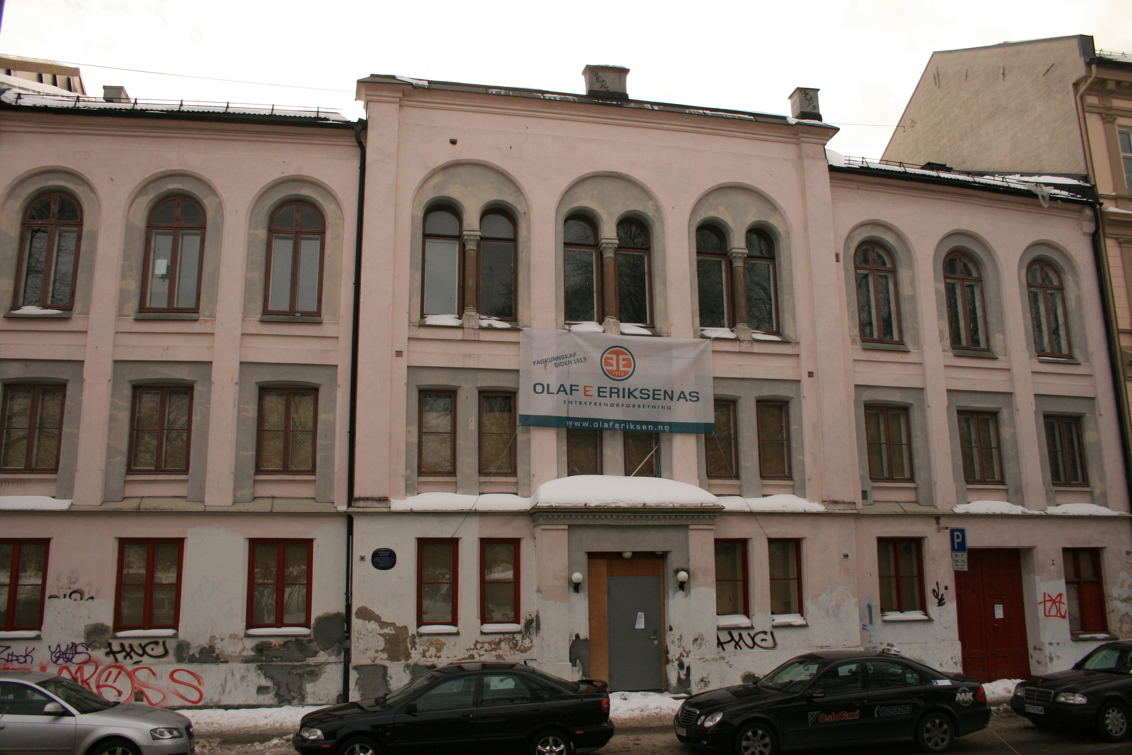 Hauges Minde er en bygård på Grünerløkka i Oslo. Den ligger i Sofienberggata og har adresse Olaf Ryes plass 2. Gården blei bygd i 1875 som bedehus.